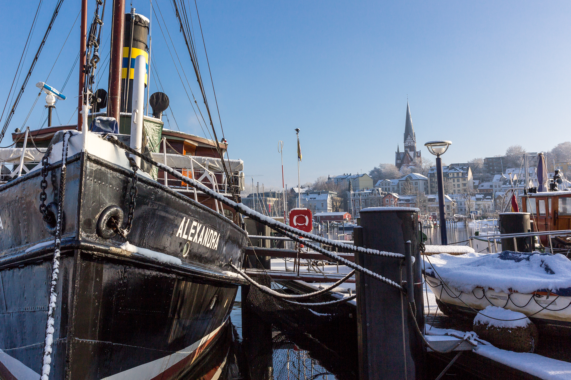 Das Museumsschiff "Alexandra" in Flensburg im Winter. Im Hintergrund befindet sich die St. Jürgen-Kirche.